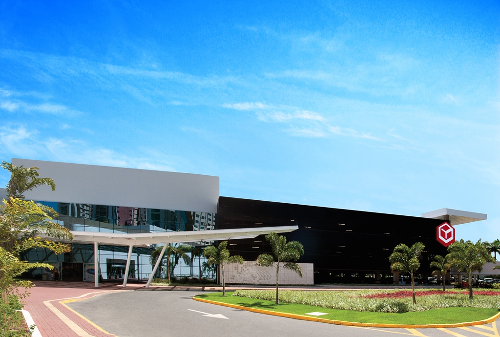 Fachada da 5ª etapa do Shopping Recife